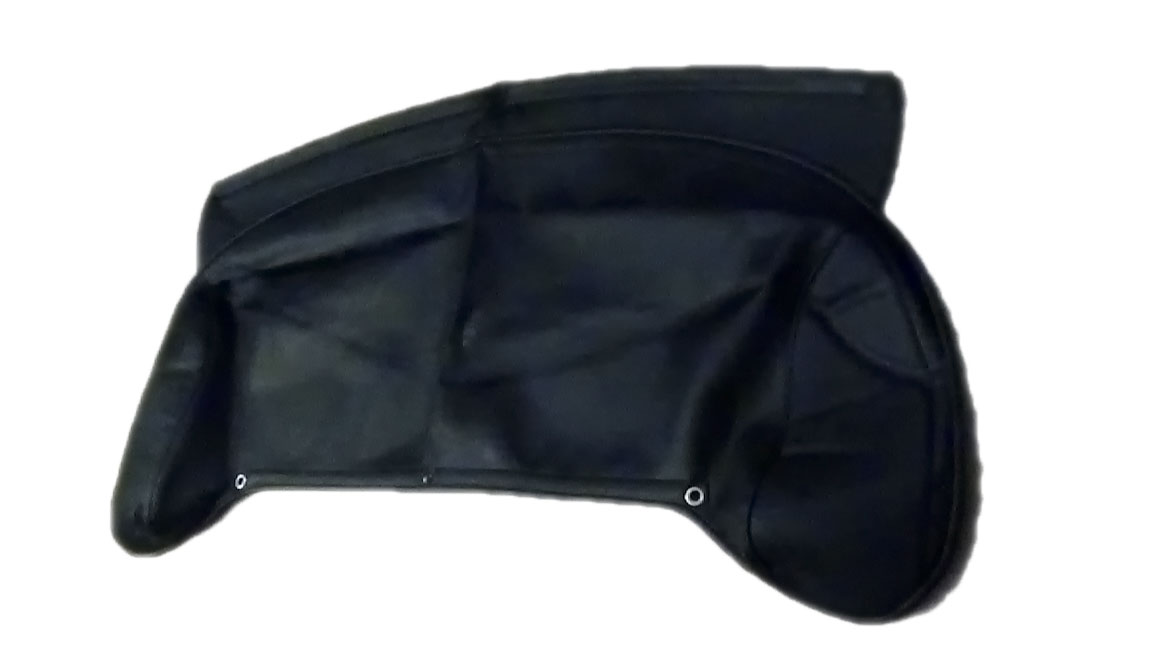 MGF Persenning